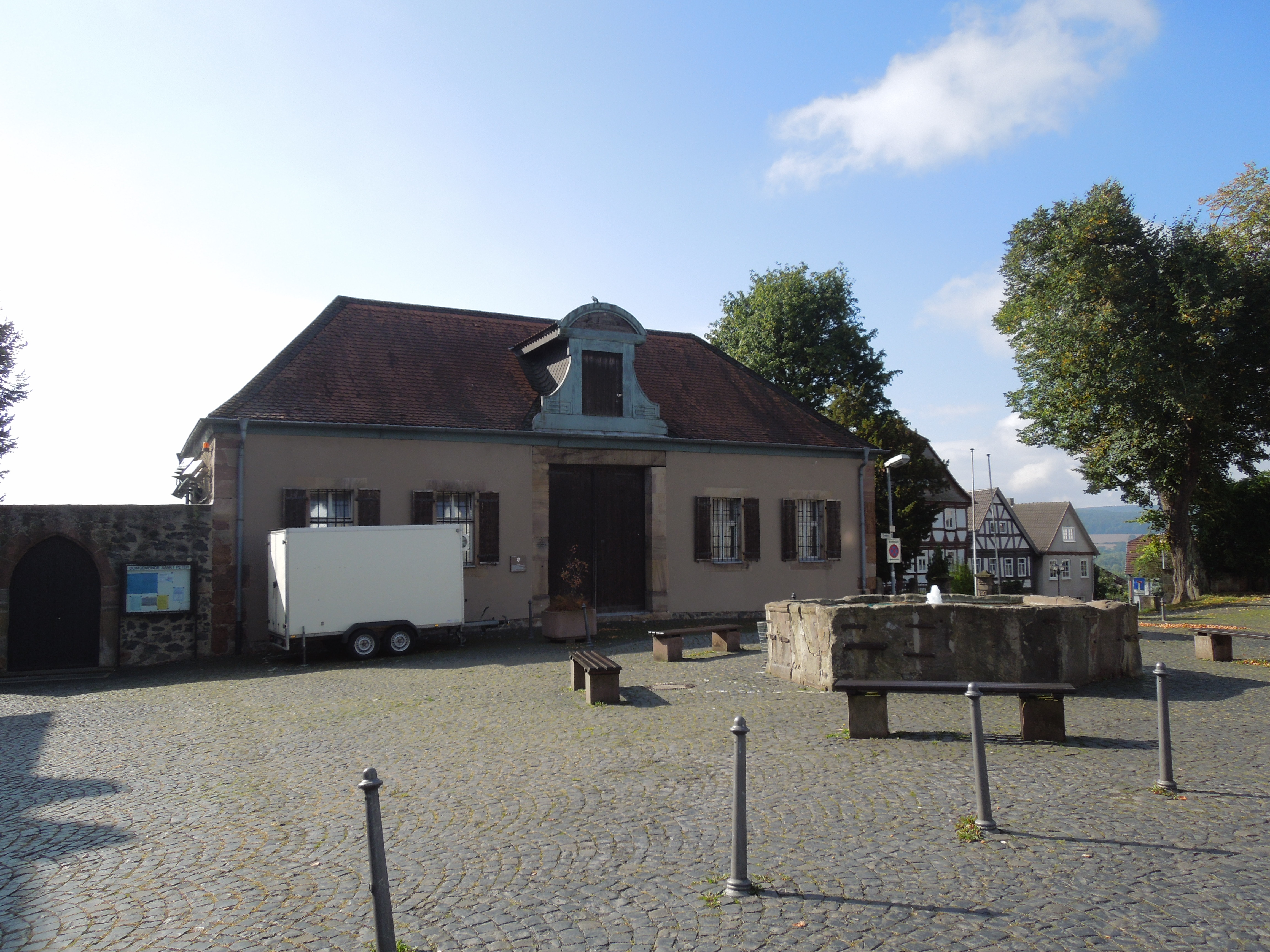 Fritzlar, Domplatz: Der ehemalige Stiftssaal des St. Petri-Stifts, später als Zehntscheune genutzt und daher auch "Alte Waage" genannt. Davor ein Kump. Auf einem romanischen Keller wurde nach der Zerstörung der Stadt durch Konrad von Thüringen im Jahre 1232 ein gotischer Bau errichtet, der bis 1540 als Kapitelstube und Stiftssaal diente. Danach wurde er als Zehntscheune genutzt. Die barocke Fassade und der Dachstuhl stammen aus dem 18. Jahrhundert, nach den Zerstörungen des Siebenjährigen Kriegs. Seit Totalsanierung 1978-1980 Nutzung als Gemeindesaal.